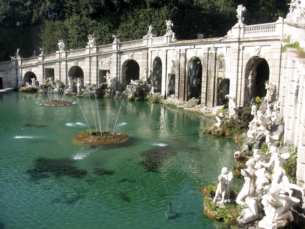 Brunnen im Garten des Königspalasts von Caserta